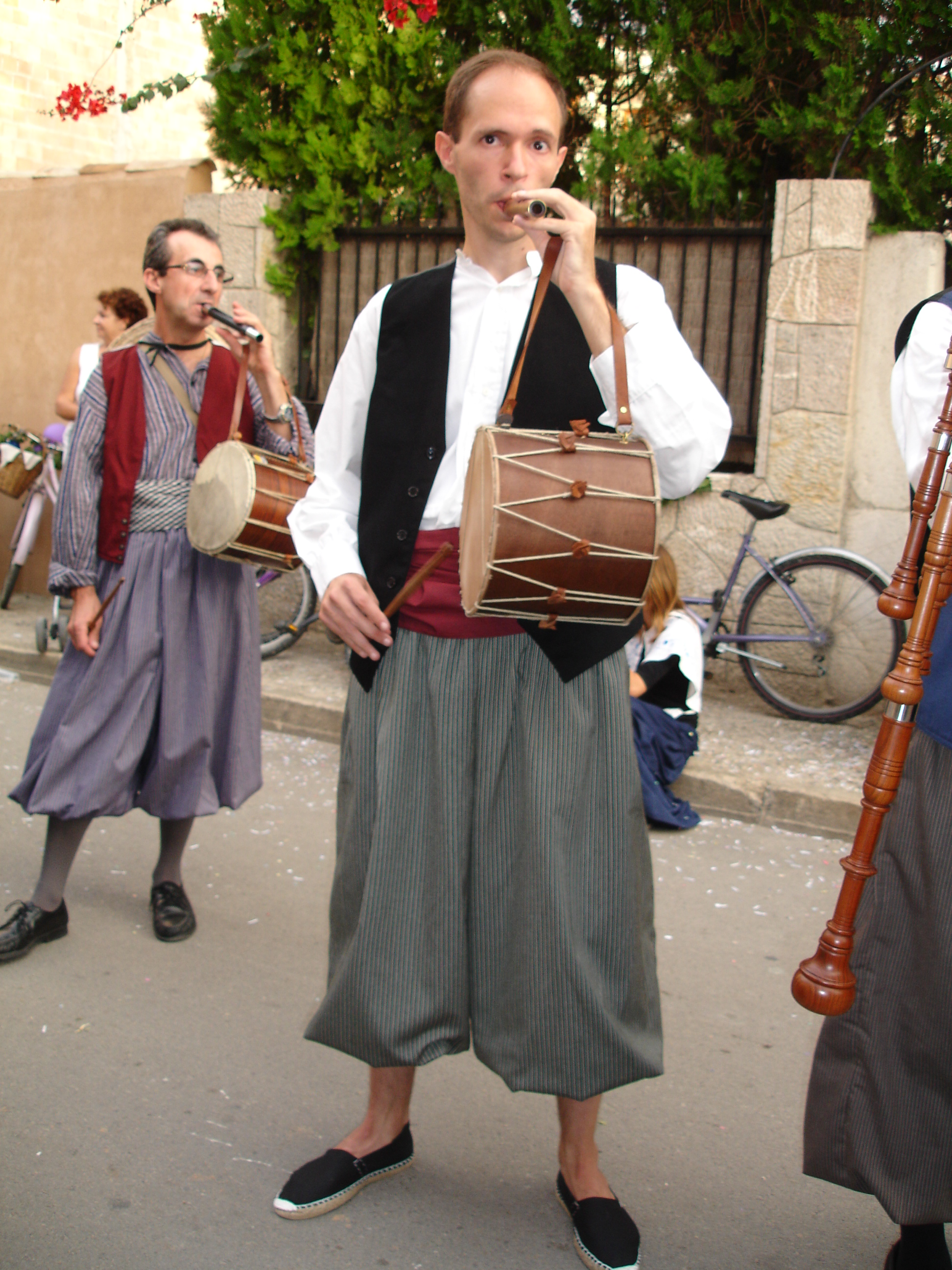 En plena faena (descripción del autor)